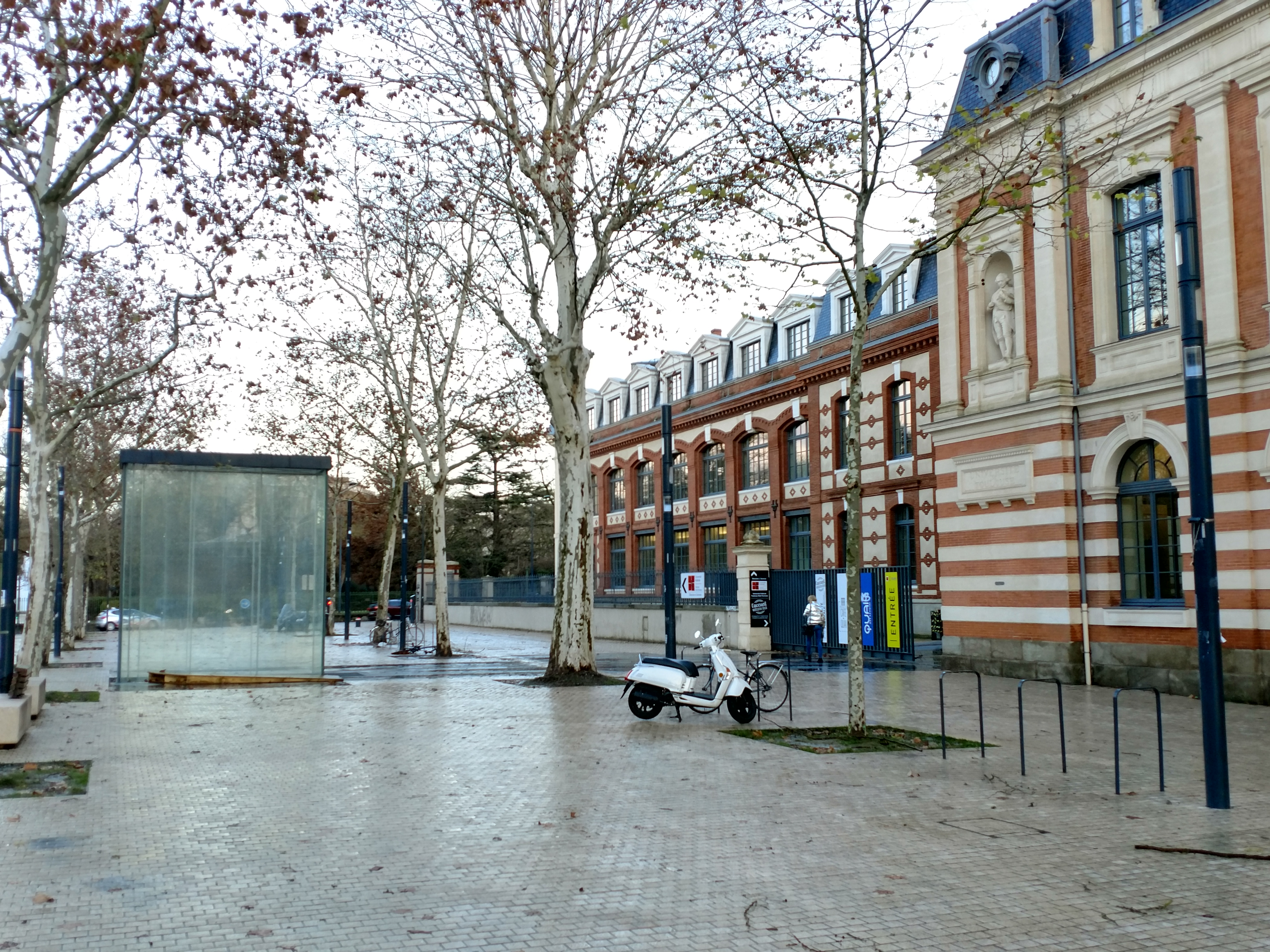 Vue de la façade du Quai des Savoirs à Toulouse avec sa boîte signal en verre, depuis les allées Jules-Guesde.